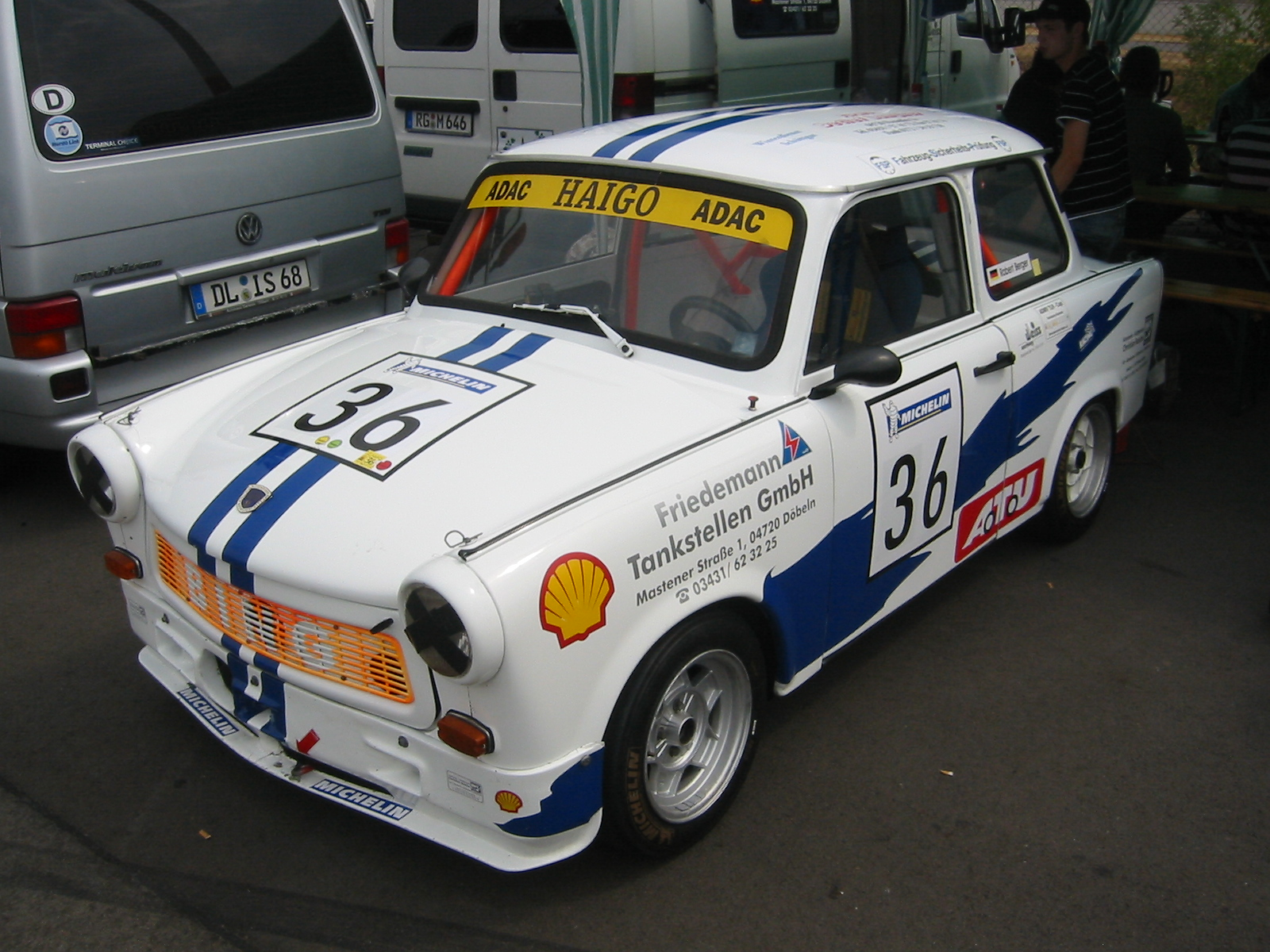 Eine Rennpappe auf dem Eurospeedway.IMG_9721